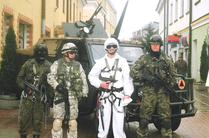 21 Brygada Strzeców Podhalańskich - mundury polowe